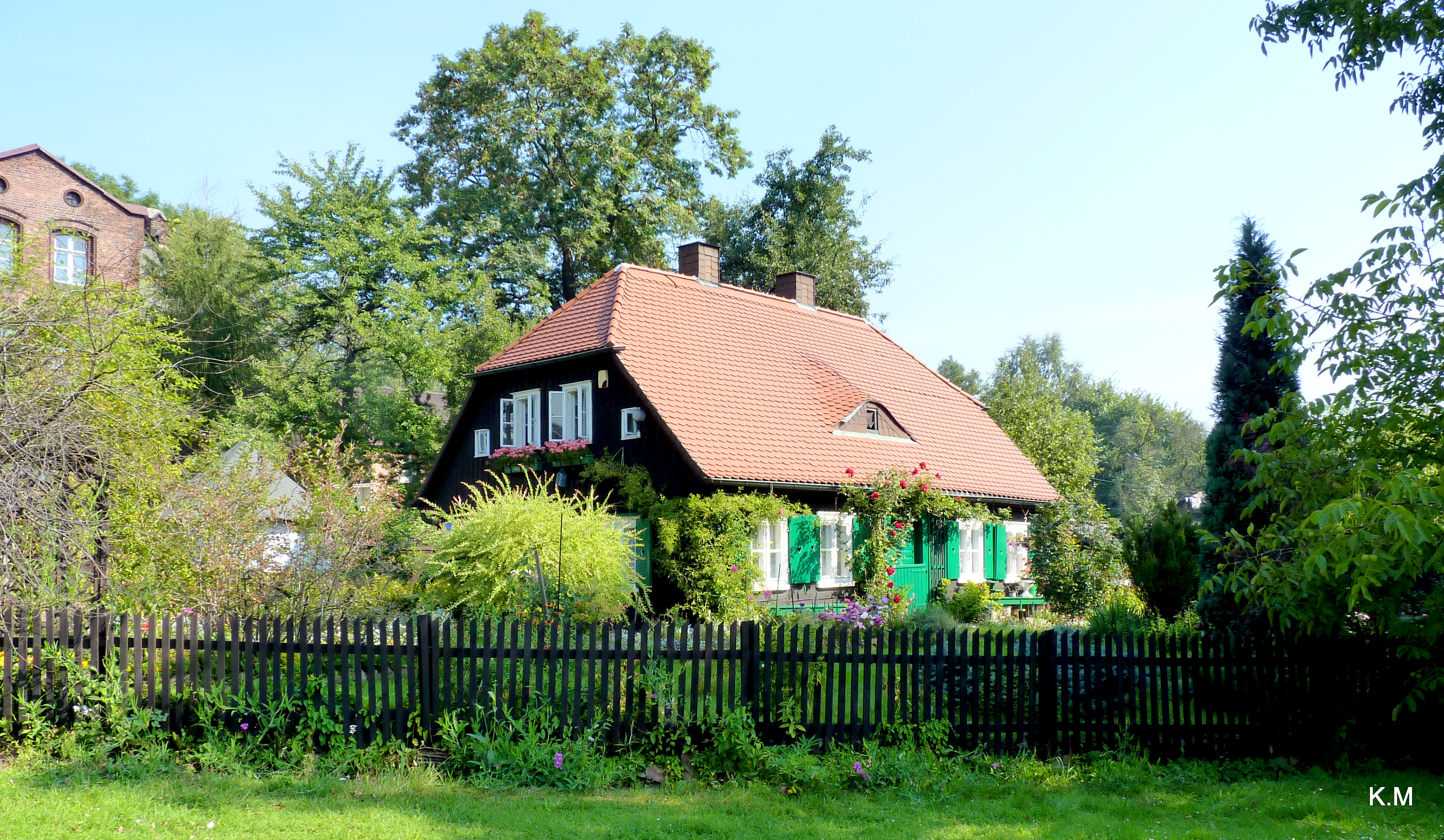 Parafia Ewangelicko-Augsburska - dom przy ogrodzeniu.